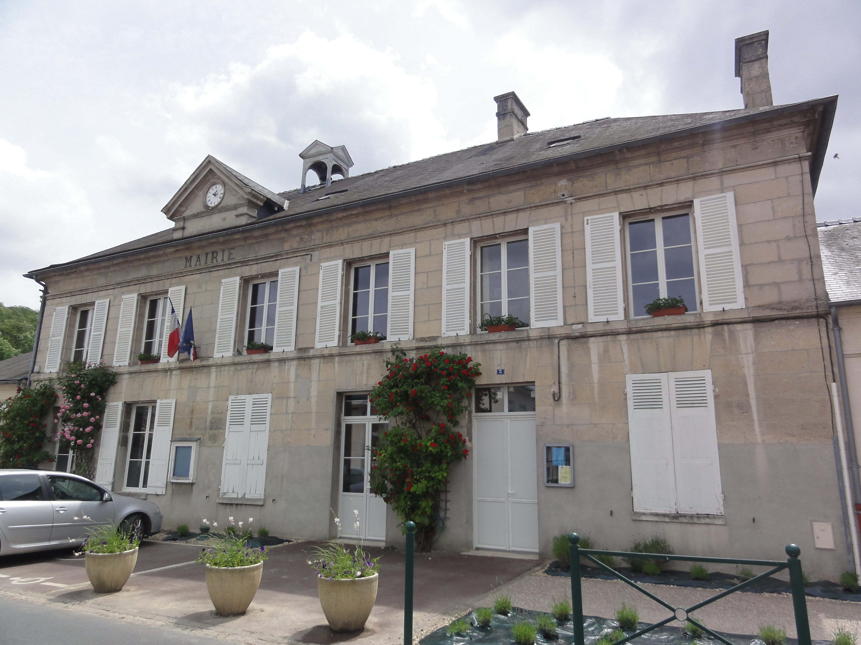 Cuise-la-Motte (Oise) Mairie